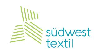 Suedwesttextil Logo neu